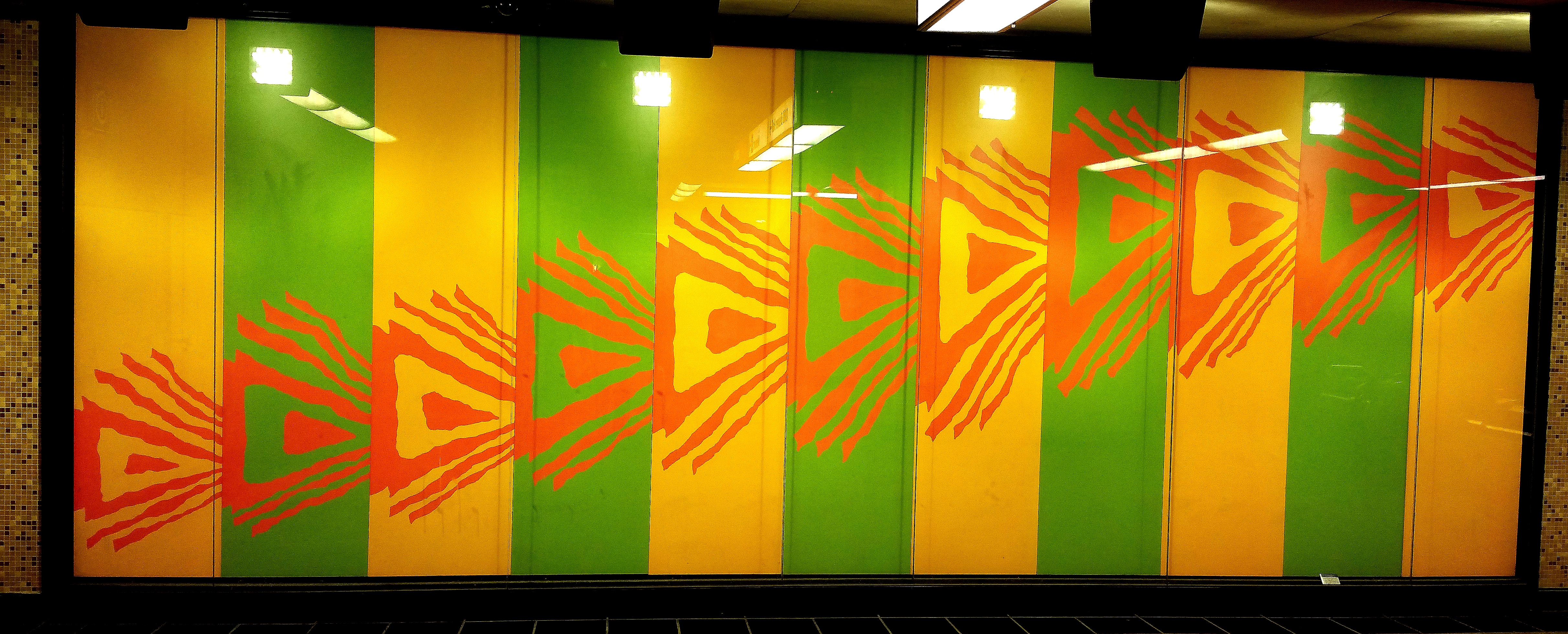 Murale de Jean-Paul Mousseau dans la station Square-Victoria du métro de Montréal